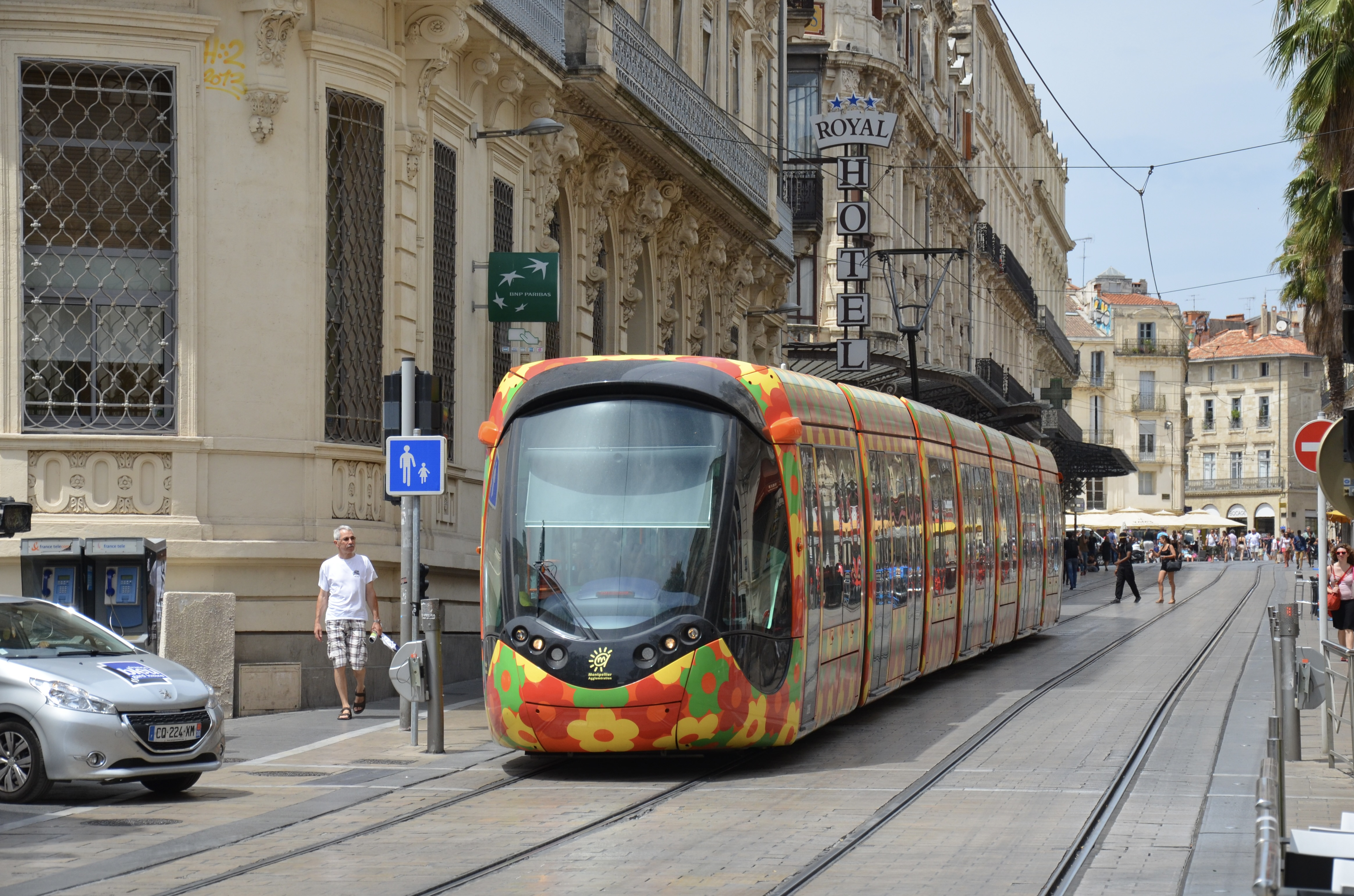 Alstom Citadis 402 n°2096 sur la ligne T2 du réseau TAM de Montpellier, près de la station Gare Saint-Roch.